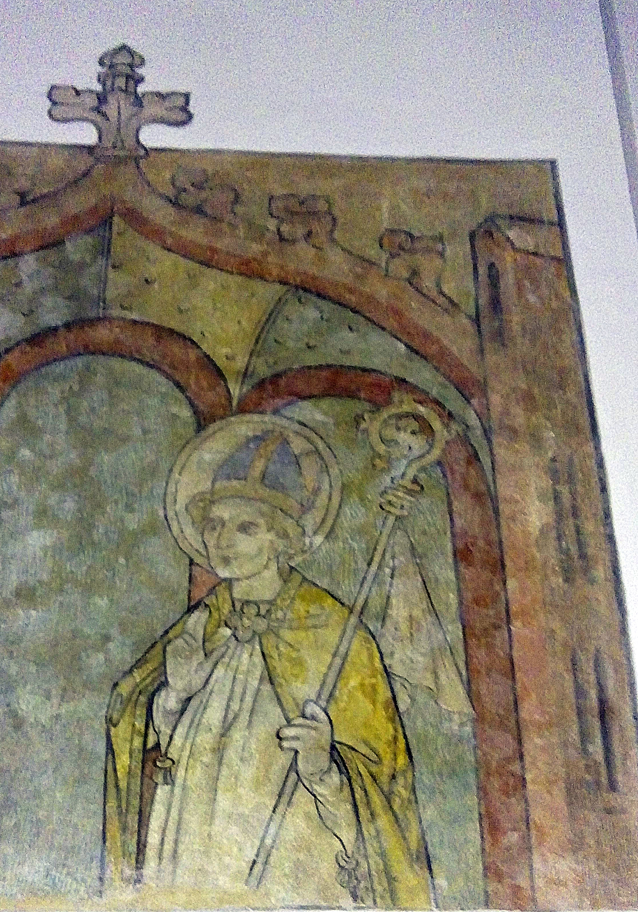 St. Rufus von Metz, mittelalterliche Darstellung, Langhaus, Seitenschiff, Simultankirche Gau-Odernheim